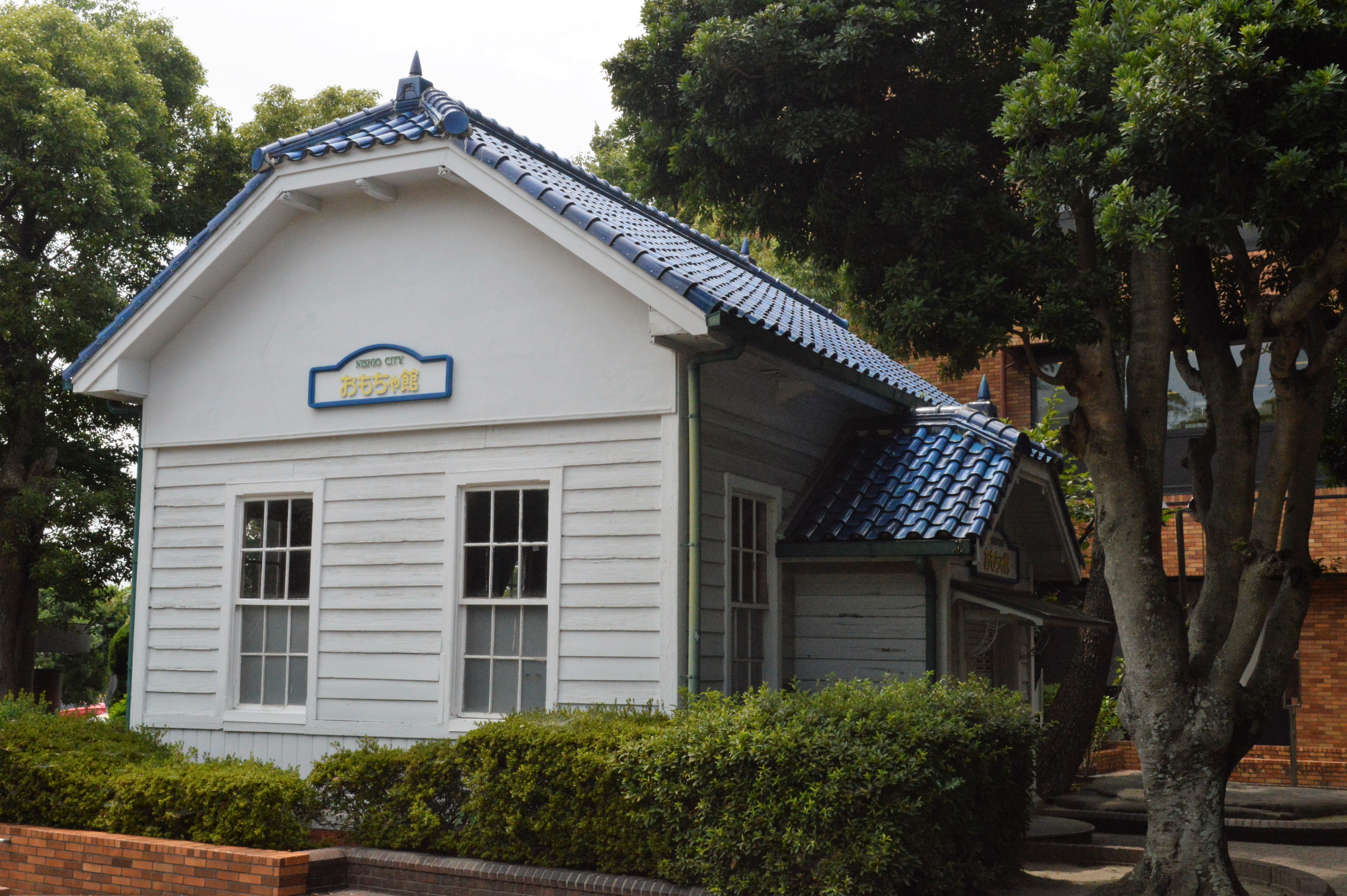 愛知県西尾市にある西尾市立図書館おもちゃ館（旧岩瀬文庫児童館）。国の登録有形文化財。